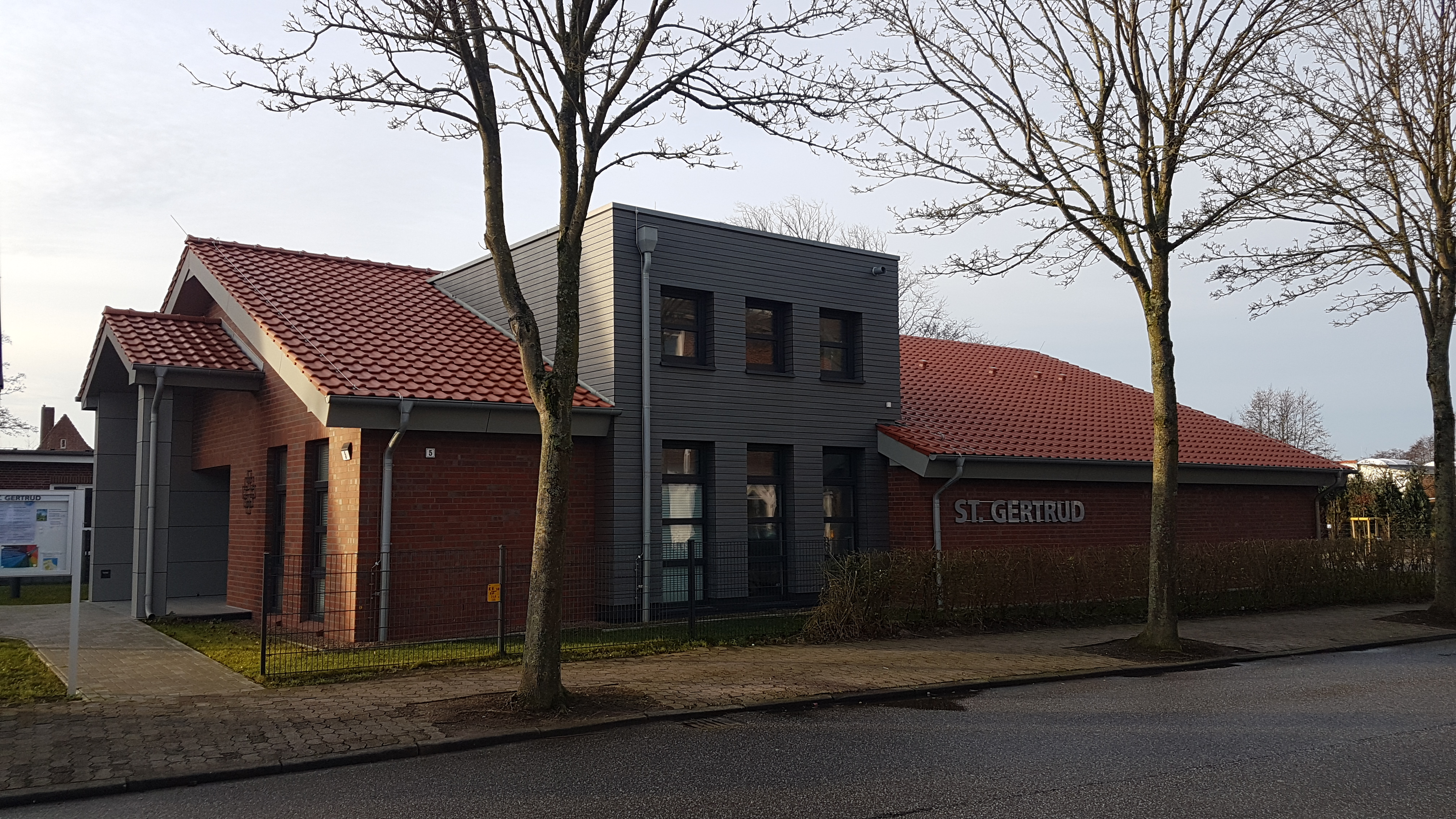 Cuxhaven Gemeindehaus St Gertrud Steinmarner Straße